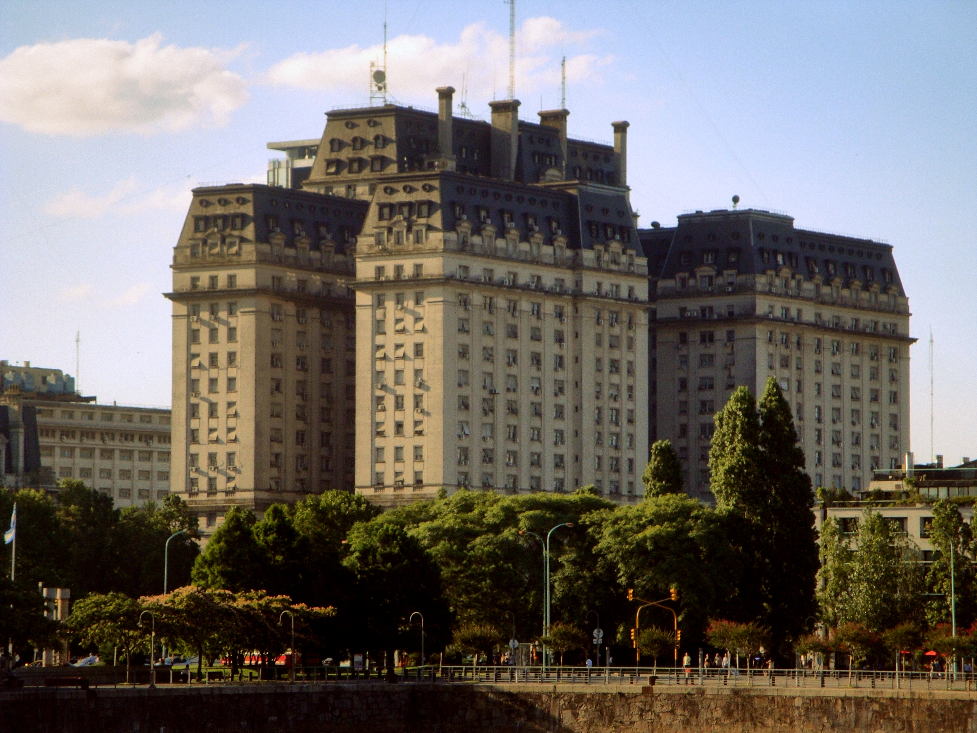 Edificio Libertador visto desde Puerto Madero.